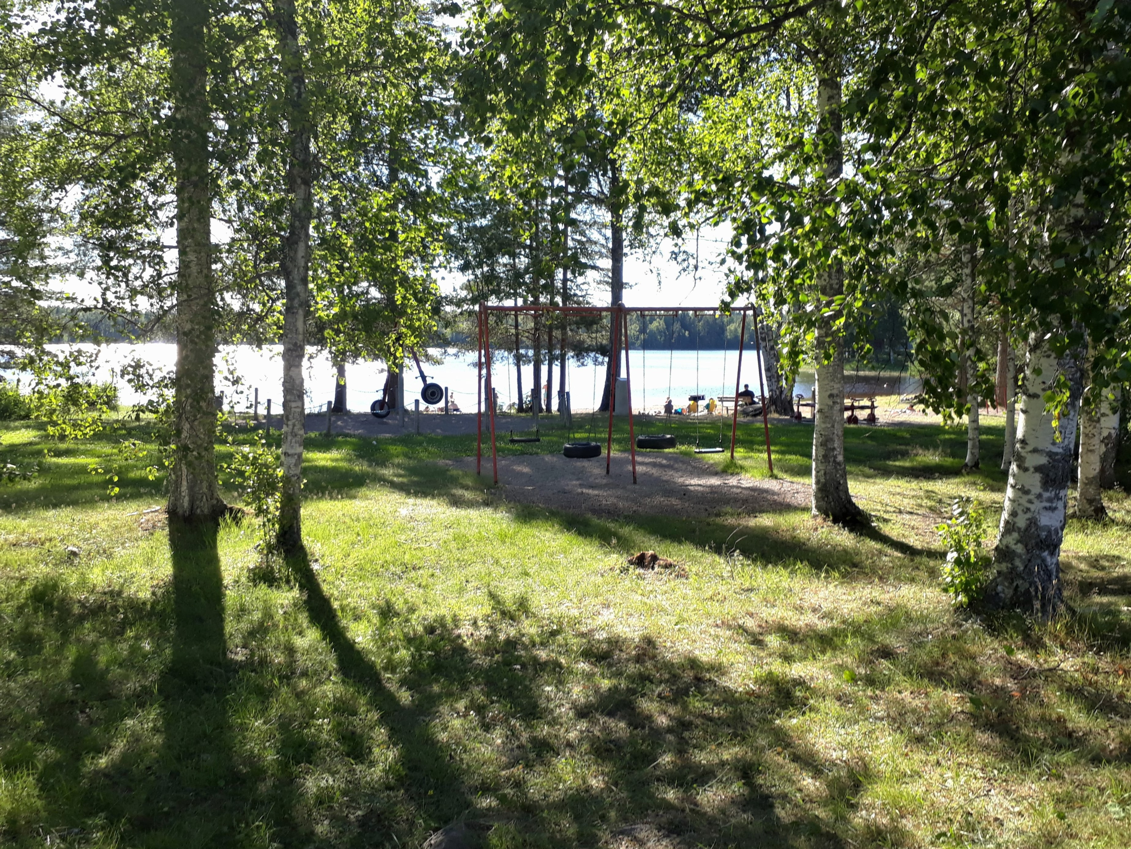 Lillsjöns badplats, nära Avesta (men på Norbergs sida av kommungränsen). Ansvaras för av Avesta kommun.